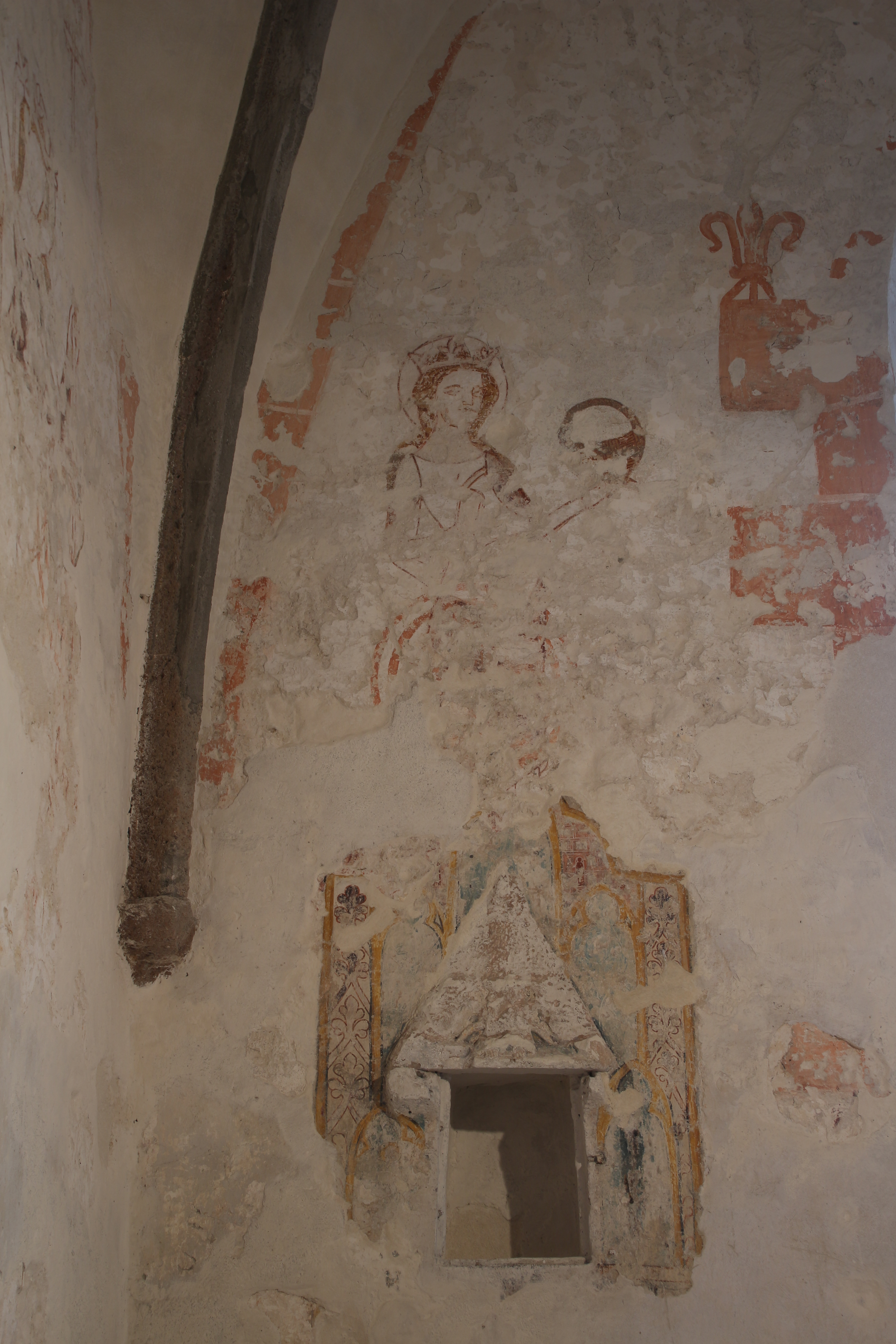 Evangelische Kirche Ober-Ohmen, Vogelsbergkreis, Hessen